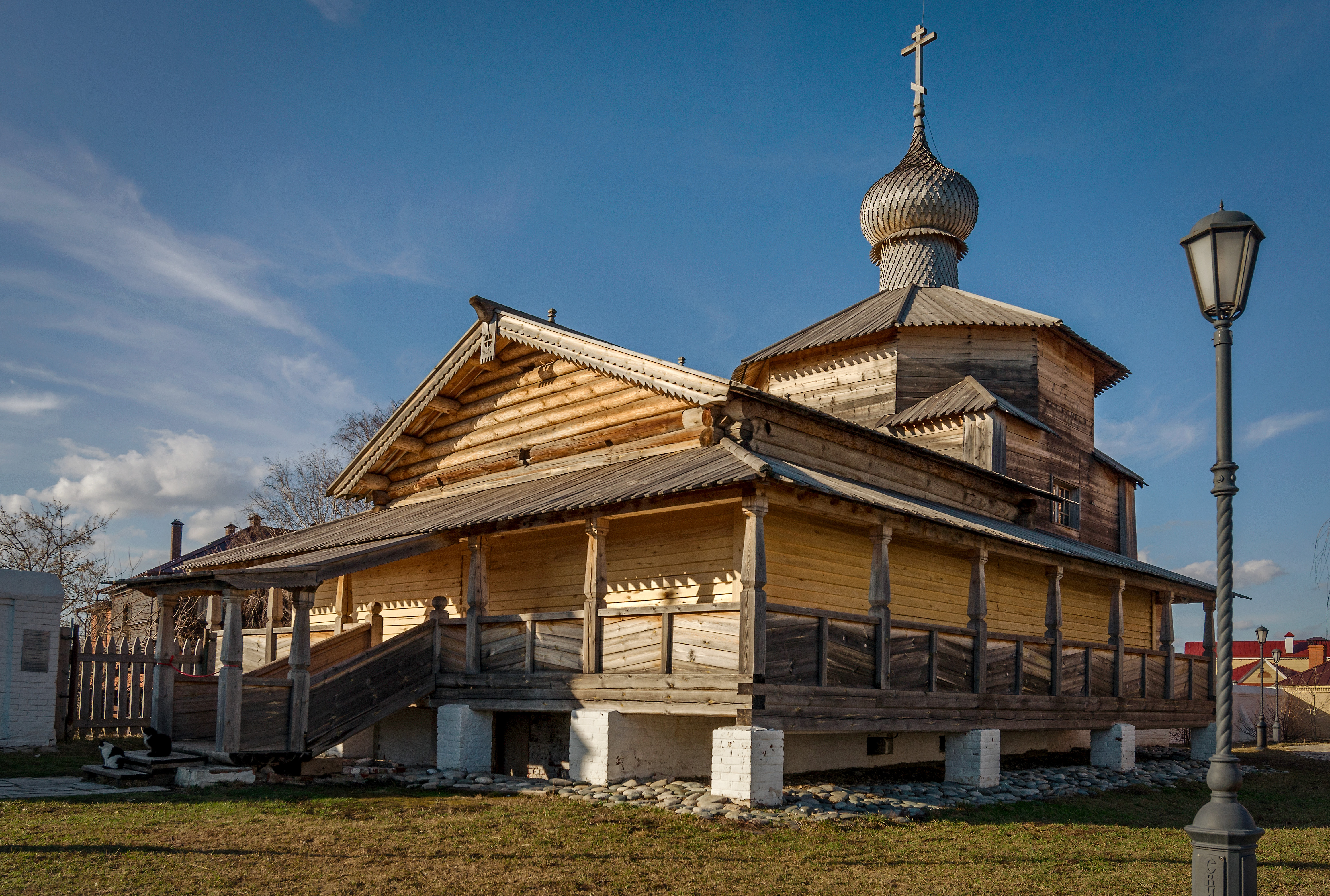 Свияжский историко-архитектурный комплекс: Верхнеуслонский район, Татарстан This image is related to the protected area of Russia number 1610064